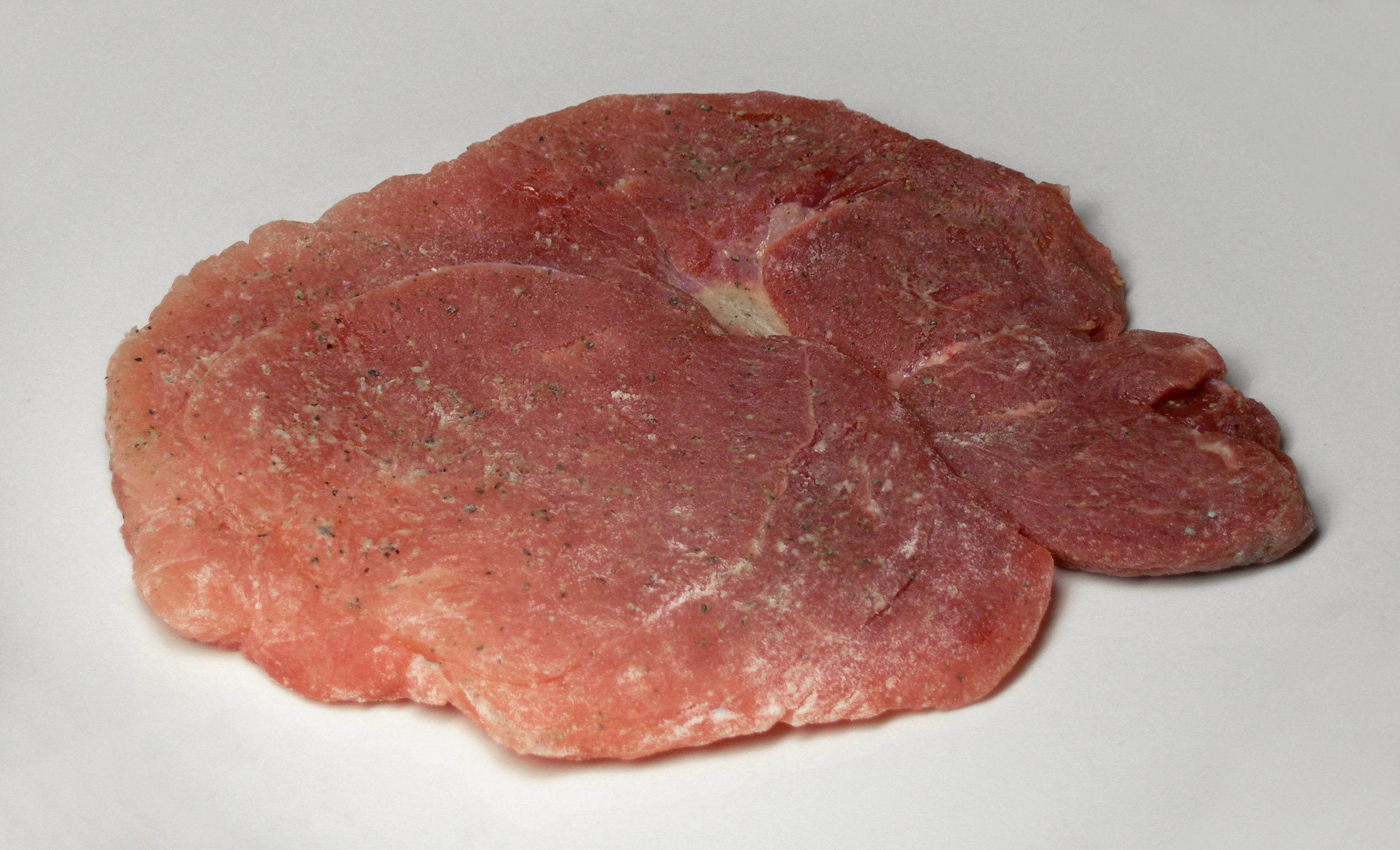 Schweineschnitzel aus dem Schinken, mehliert und gepfeffert